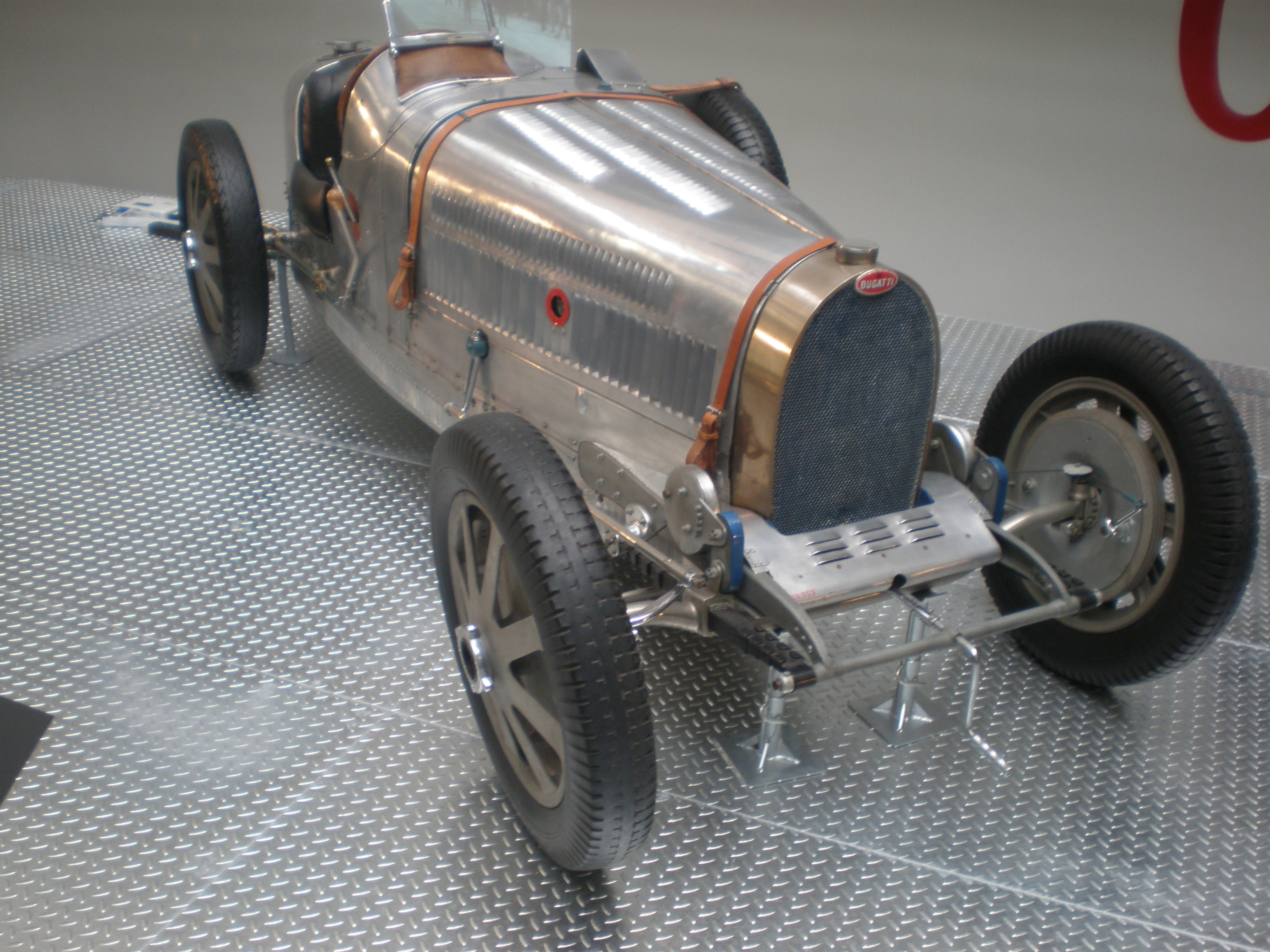 Bugatti type 51 (1931), Národní technické muzeum Praha